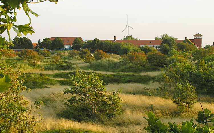 Hermann Lietz Schule auf Spiekeroog, Blick vom "Nikotinwäldchen", August 2005, Foto